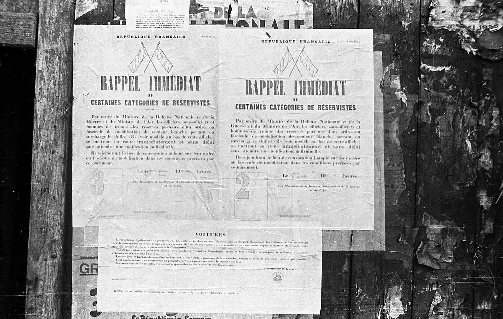 Affiche de mobilisation de réservistes, lors la crise de Munich (1938)